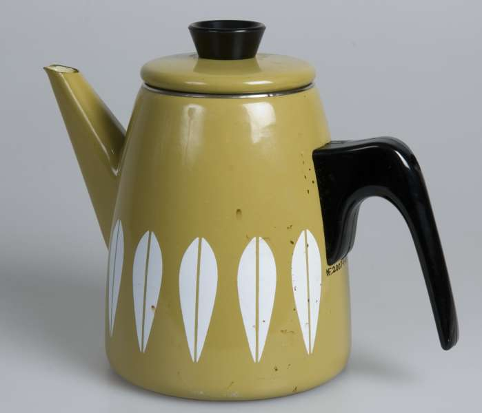 Kaffekjele produsert på Cathrineholm i Halden omkring 1965. Designet av Grete Prytz Kittelsen, dekoren «Lotus» utformet av Arne Clausen. Diameter 13. cm. Foto Anne-Lise Reinsfelt/Norsk Folkemuseum, NF.2007-0149AB.